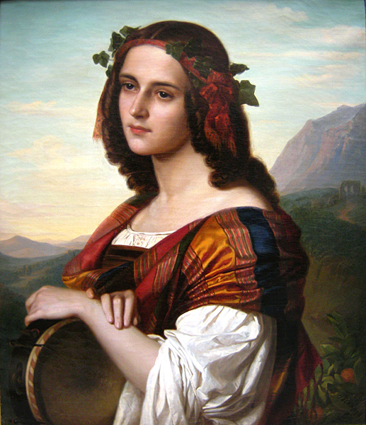 Amalie Bensinger (1808-1889), Portrait einer Italienerin